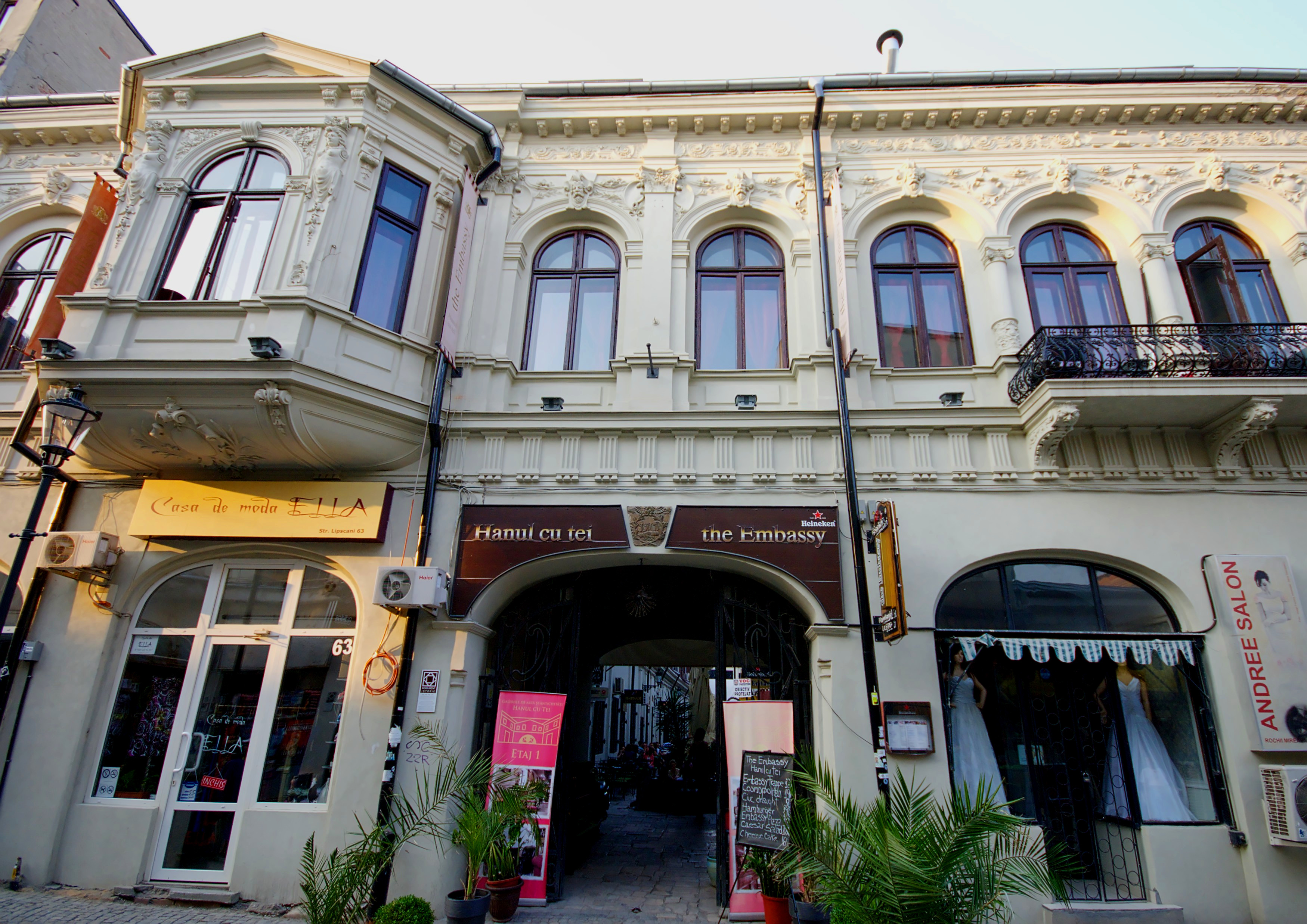 Ansamblul de arhitectură "Str. Hanul cu Tei" - ieșirea Lipscani, Lipscani 63-62, Blănari 5